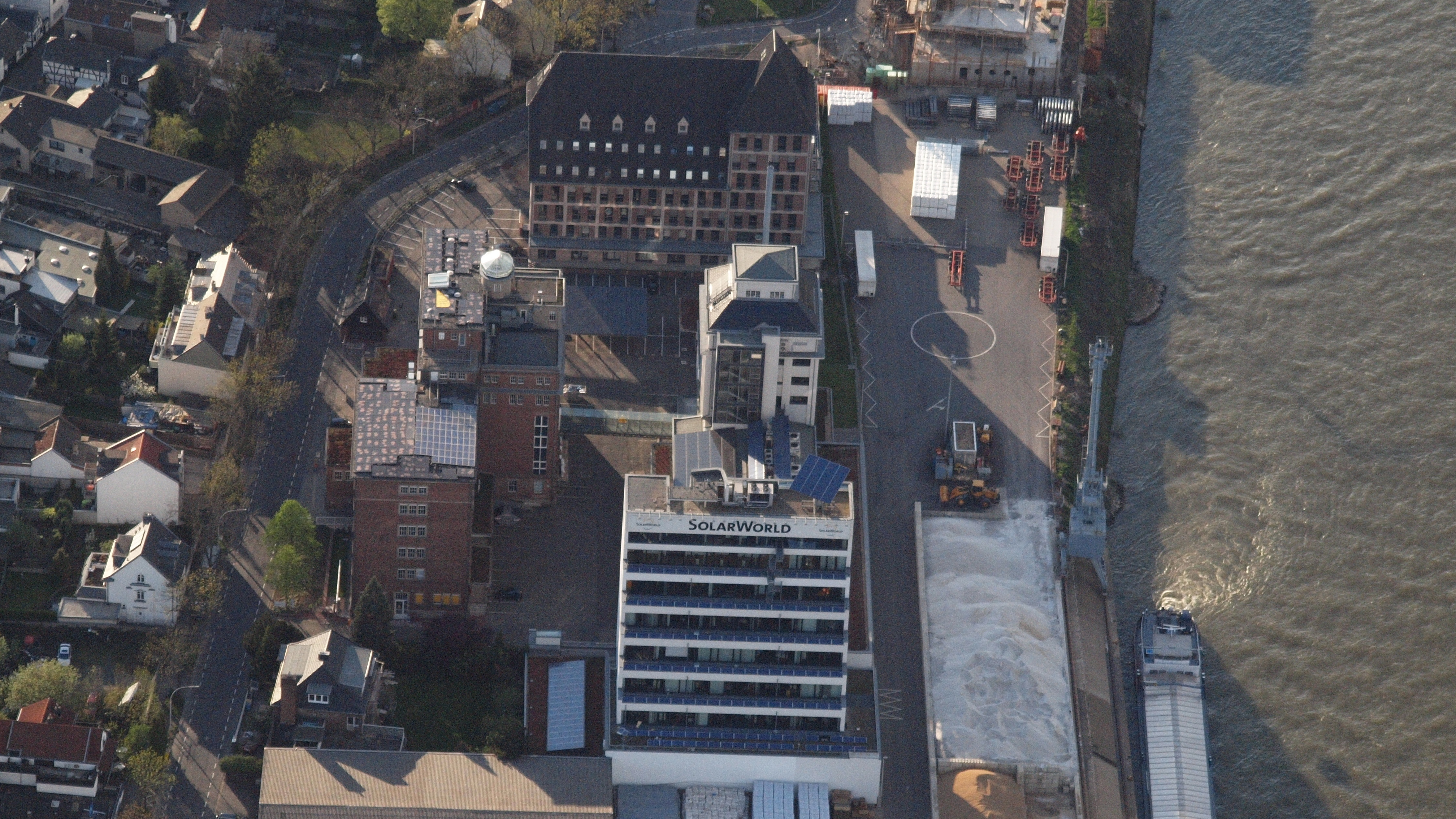 Solarworld an der Auermühle, Graurheindorf, Bonn: Luftaufnahme von Südosten